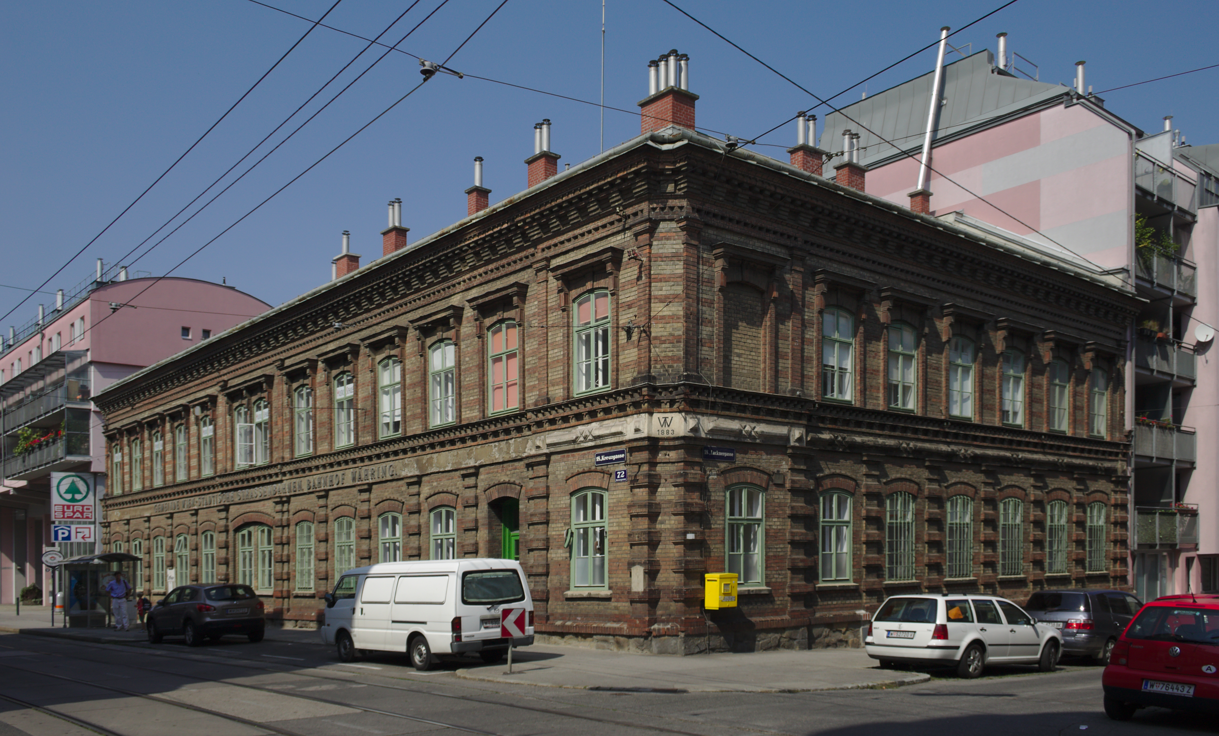 Verwaltungsgebäude Betriebsbahnhof Währing